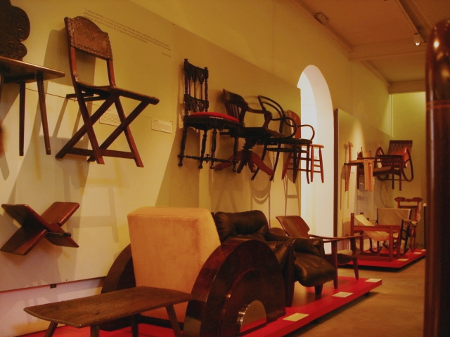 Coleção de cadeiras do Museu da Casa Brasileira, em São Paulo.